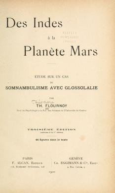 Théodore Flournoy Des Indes à la planète Mars 1900 Title